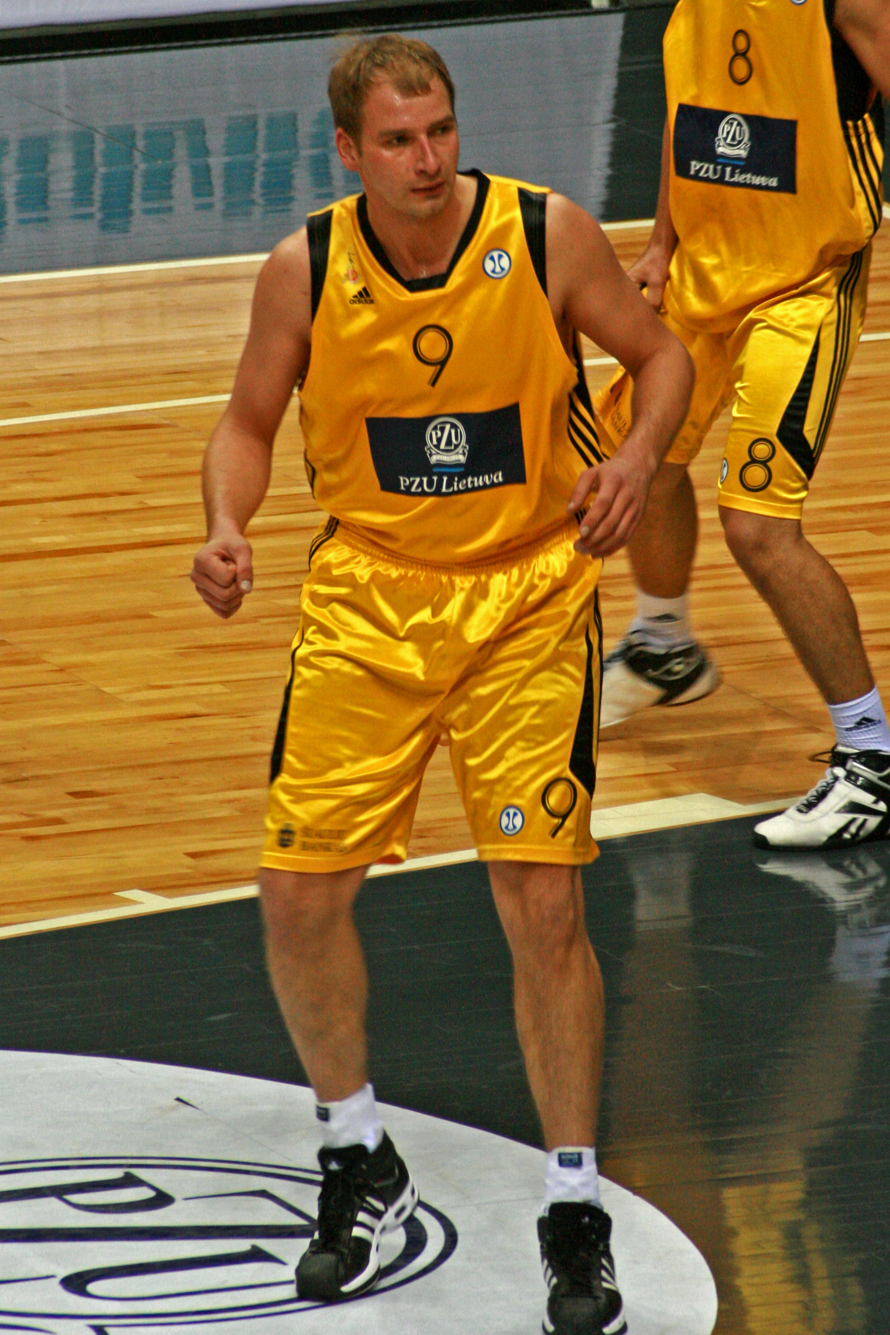 Artūras Masiulis with BC Šiauliai jersey.